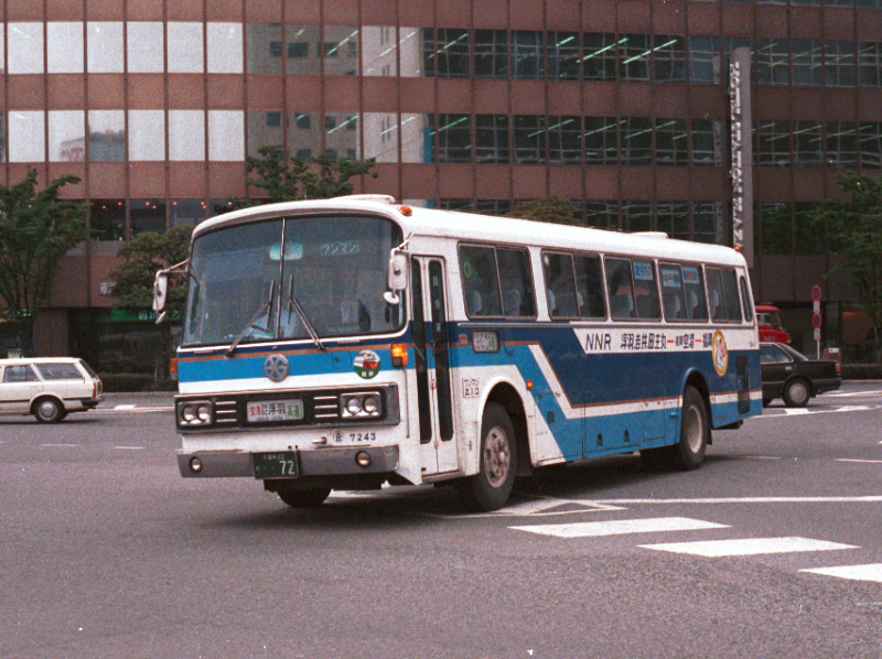 博多駅前にて、2002-4-12撮影